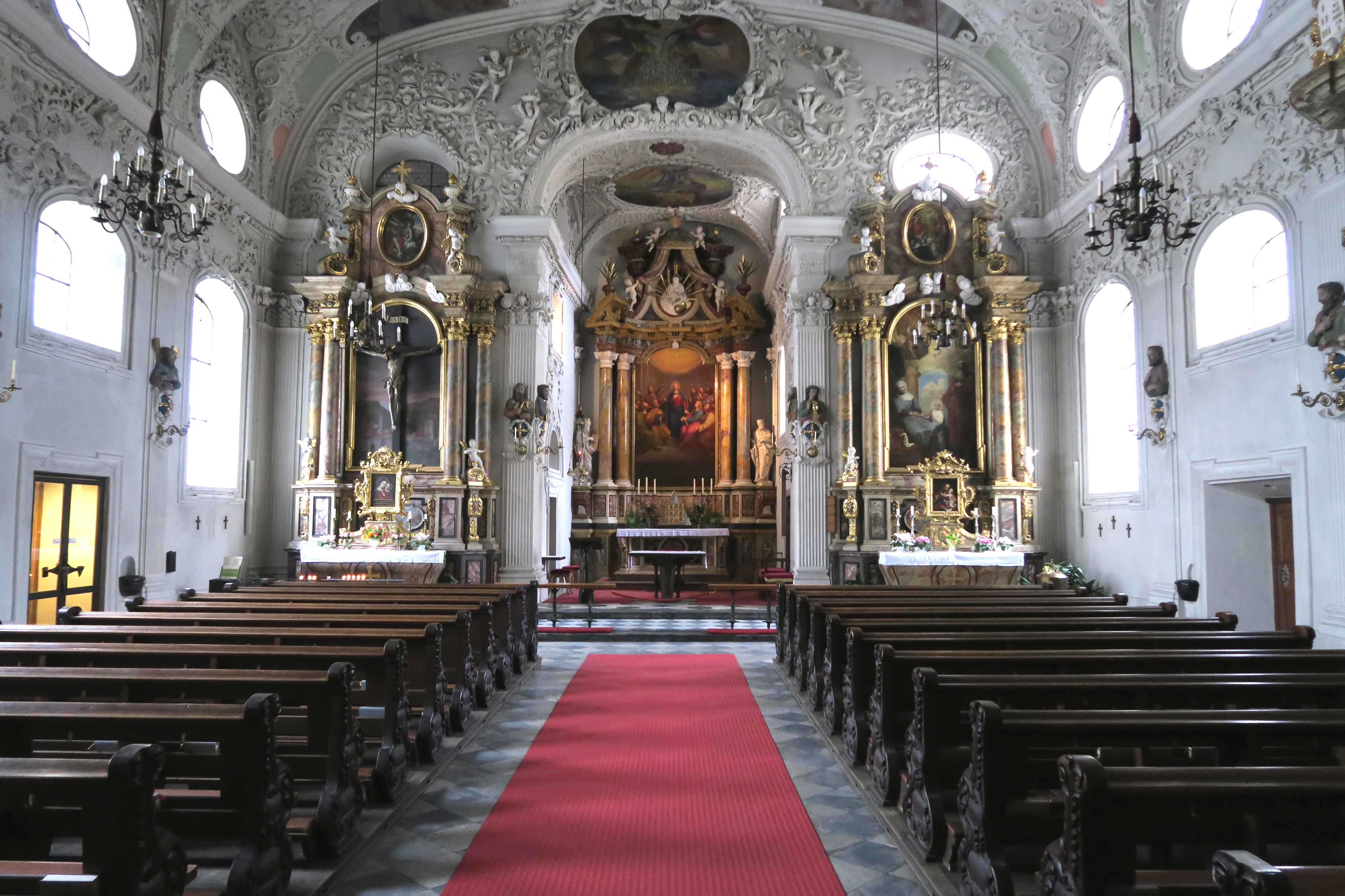 Totale des Kirchenraums innen mit Seitenältären